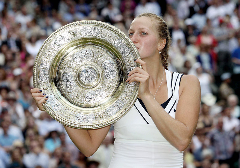 Česká tenistka Petra Kvitová s mísou Venus Rosewater pro vítězku dvouhry ve Wimbledonu, 2011